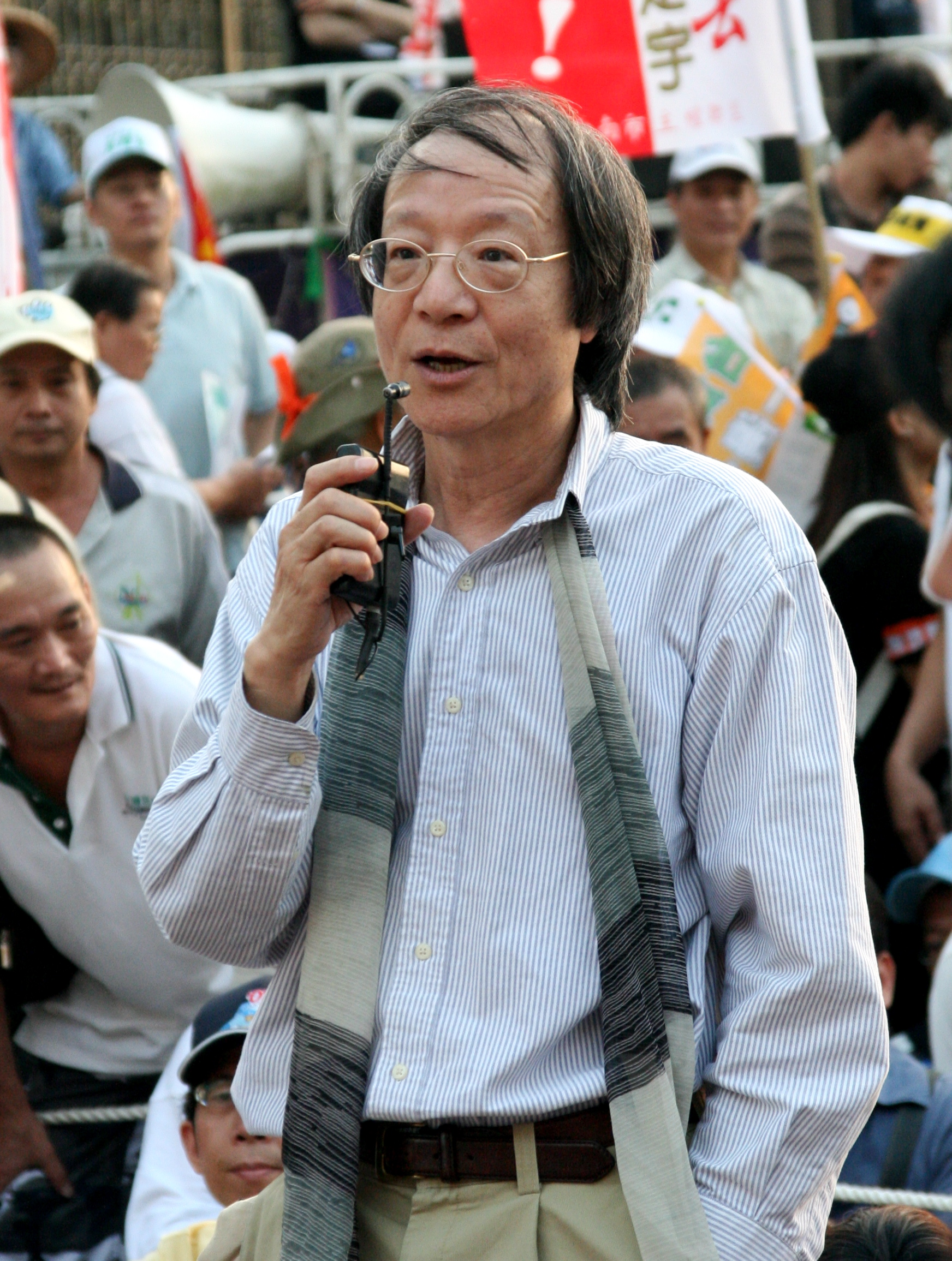 前台灣北社副社長金恆煒於2008年1025反黑心顧臺灣大遊行